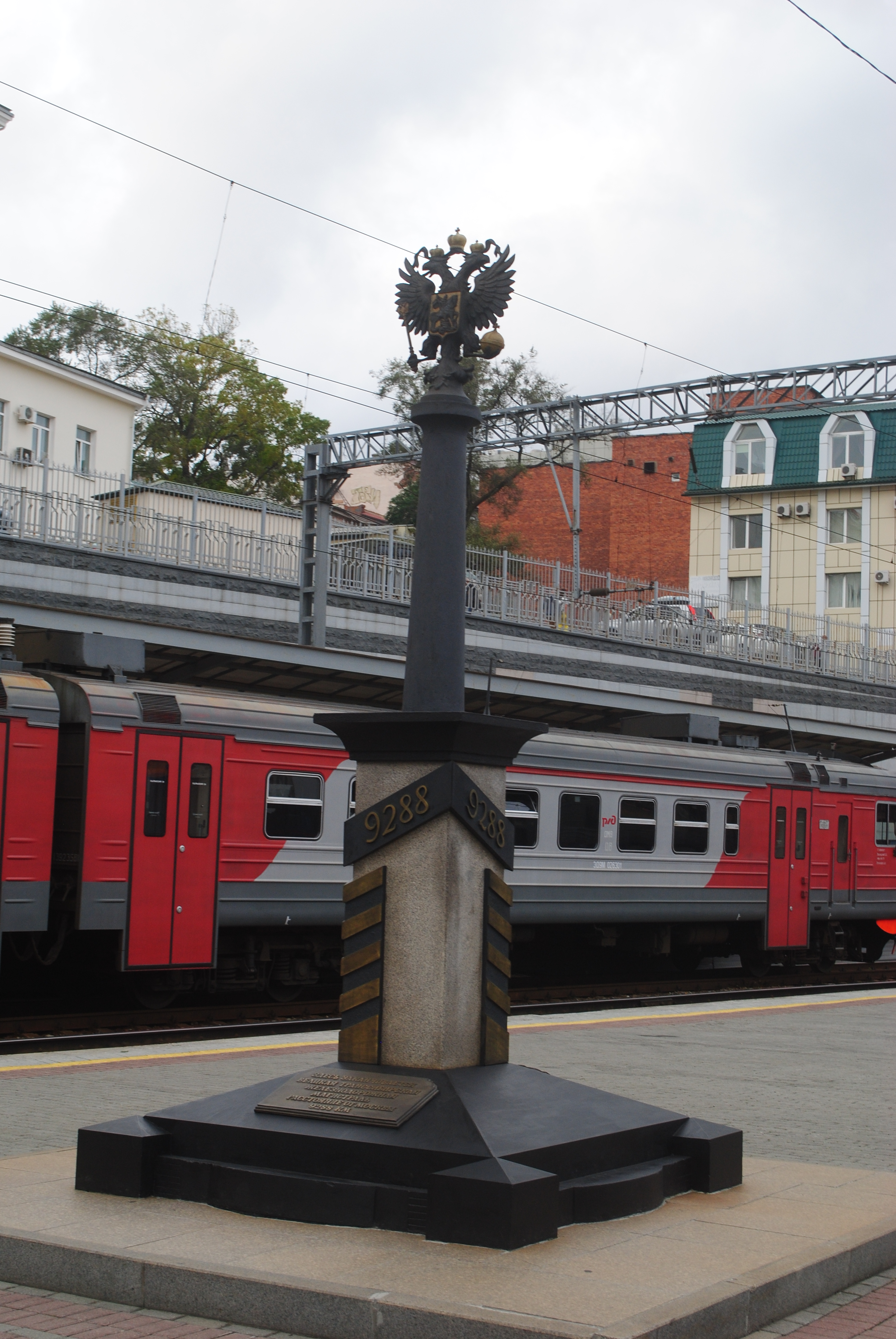 Памятный знак «Конец Транссибирской железной дороги»: улица Алеутская, 4, Владивосток, Приморский край